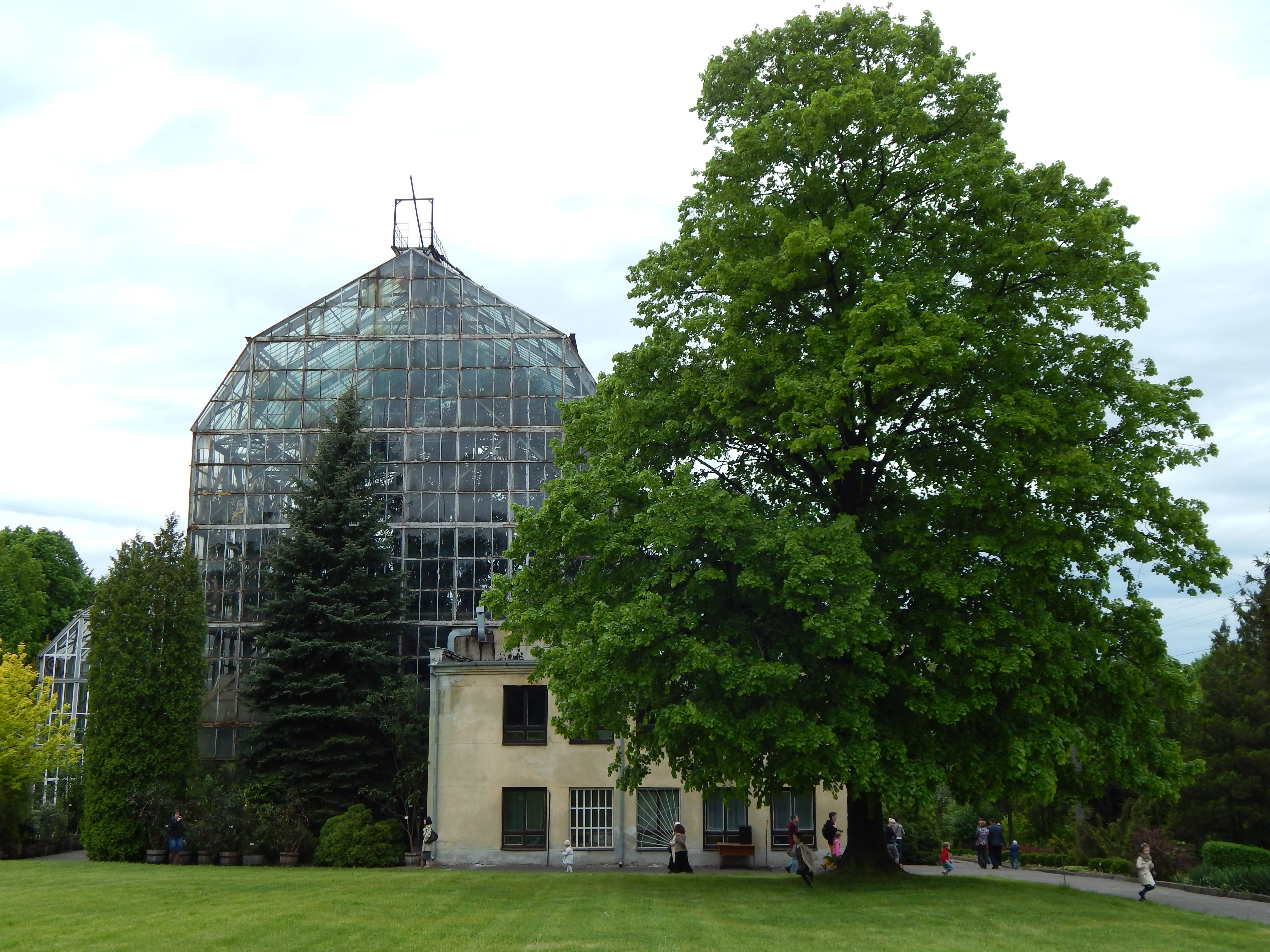 Ботанічний сад Львівського державного університету ім. Ів. Франка, м. Львів розташований на 2-х ділянках: 2 га по вул. Кирила і Мефодія,4 та 16,5 га по вул. Черемшини,44